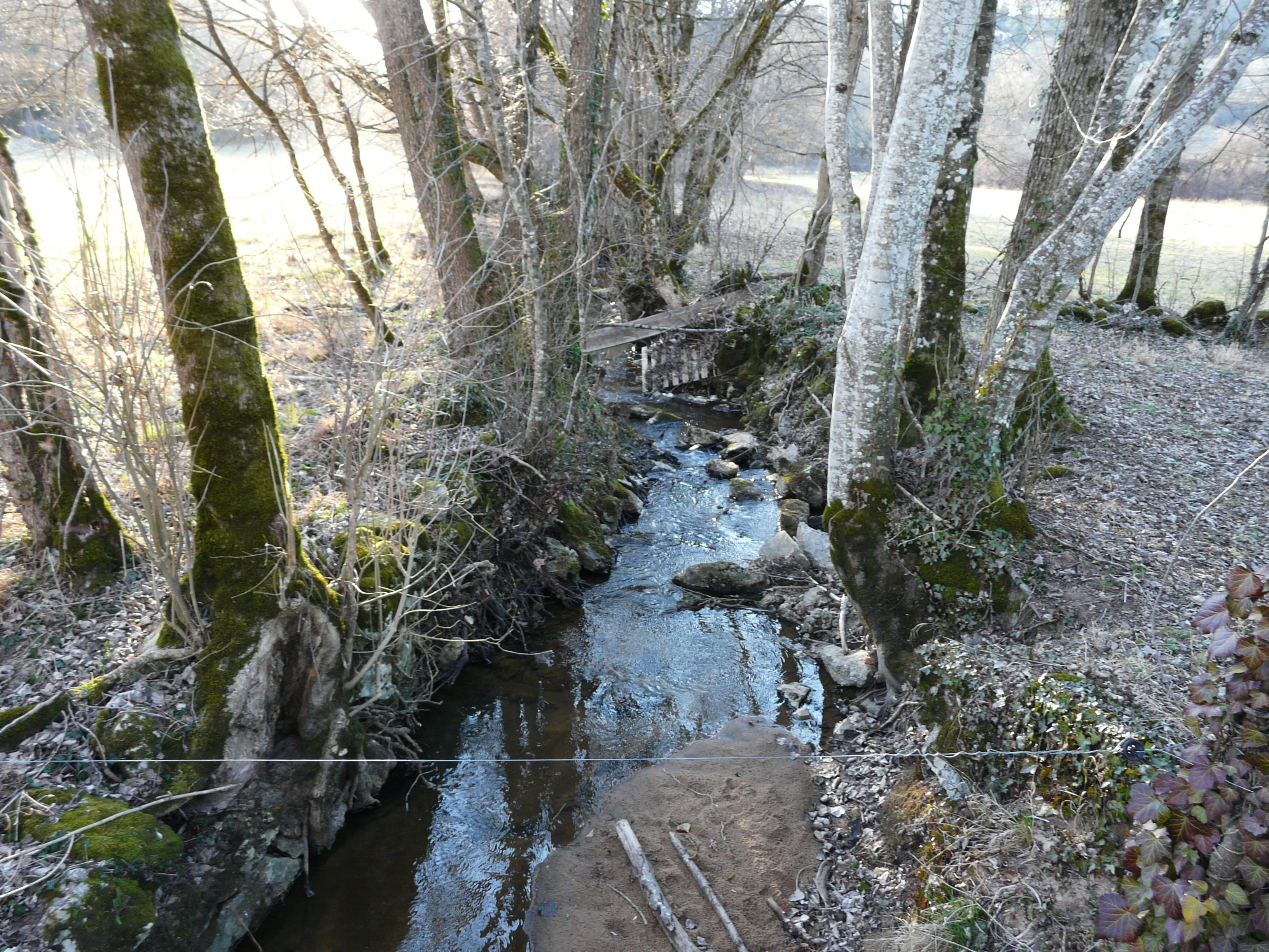 La Couze en aval de la passerelle du GR 46 au lieu-dit Couze, Noailles, Corrèze, France. Vue prise en direction de l'amont.